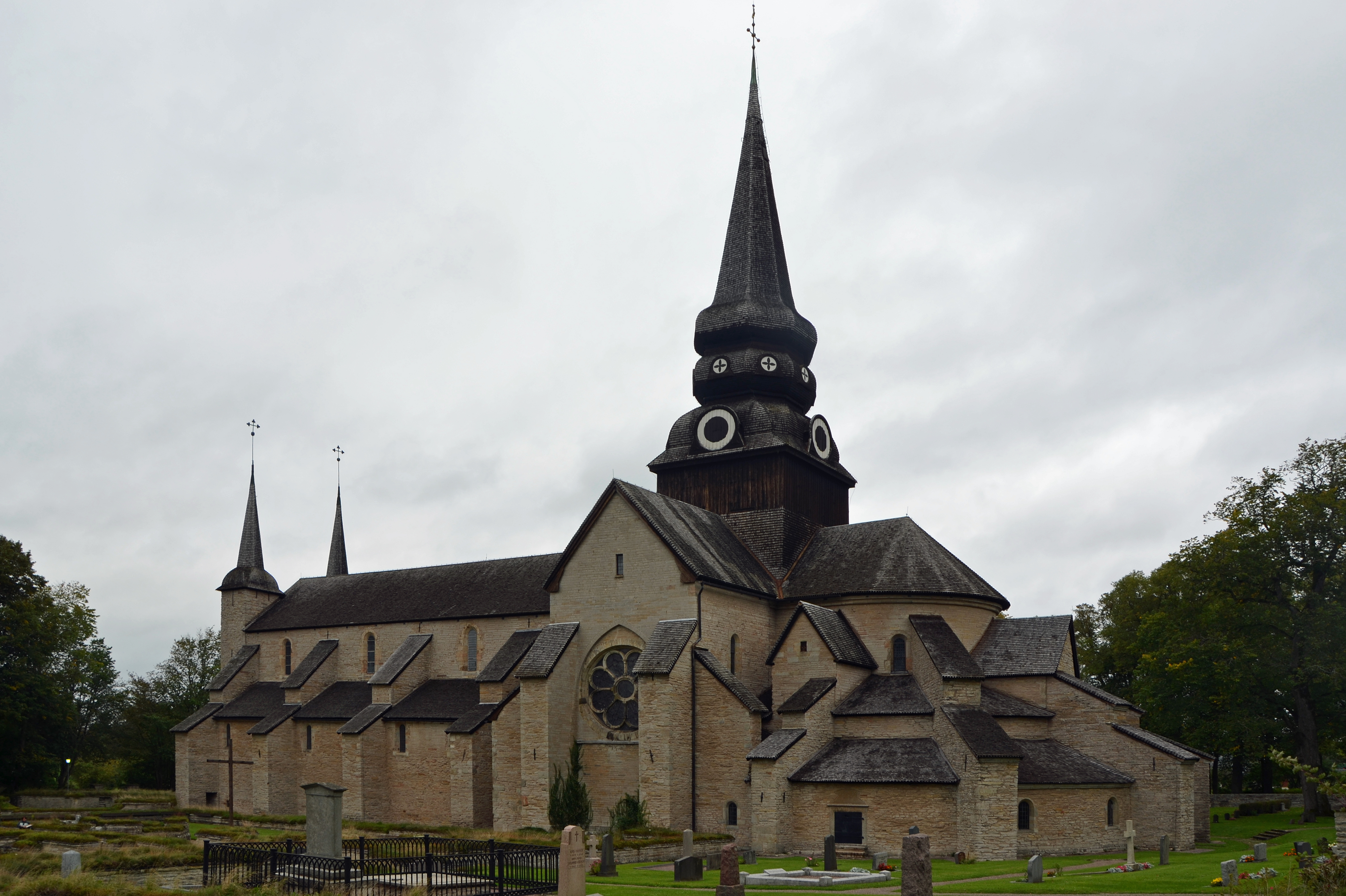 Klosterkirche Varnhem vom Südosten